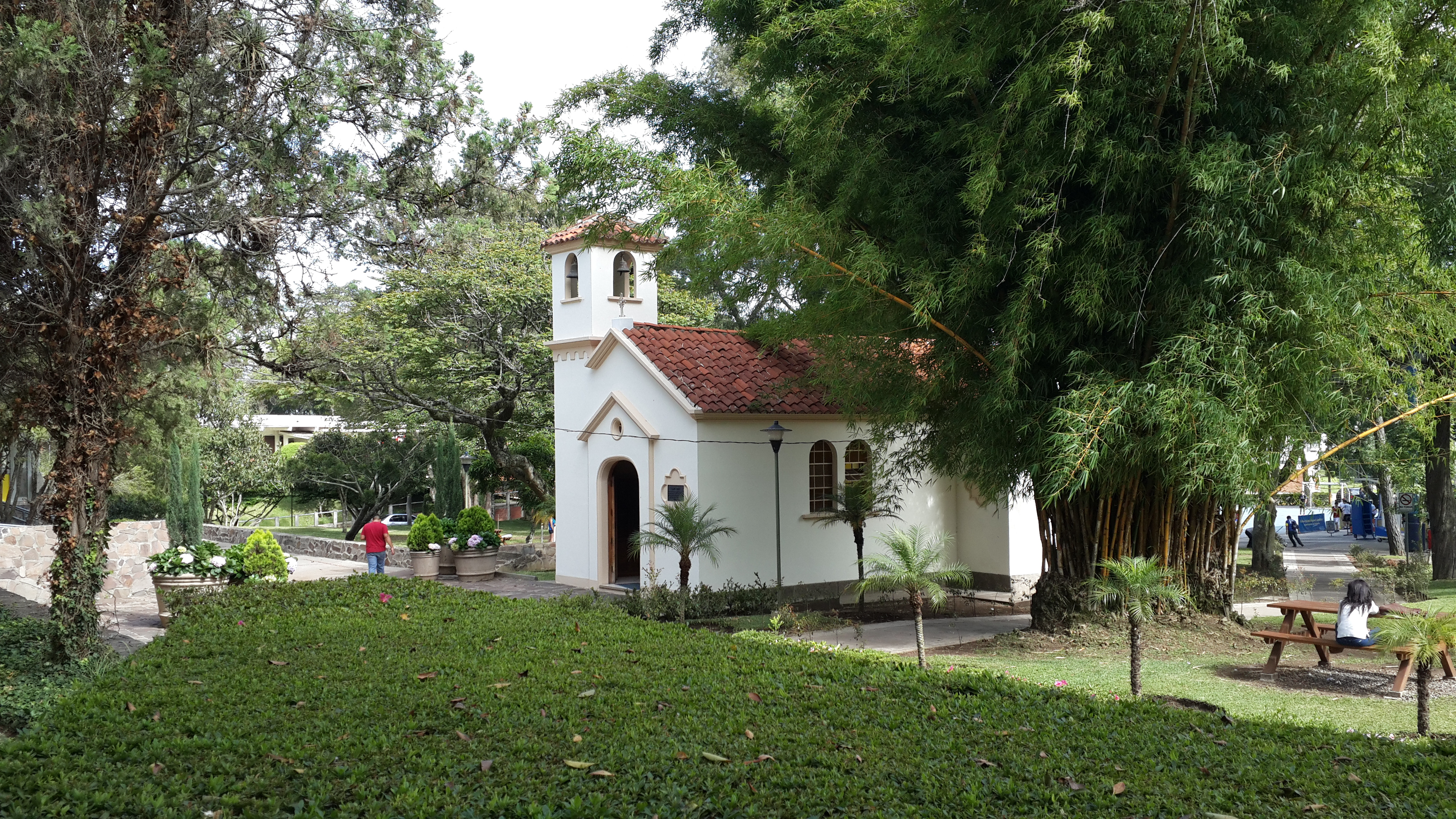 Capilla Santa Sofía, Universidad Rafael Landivar, Guatemala